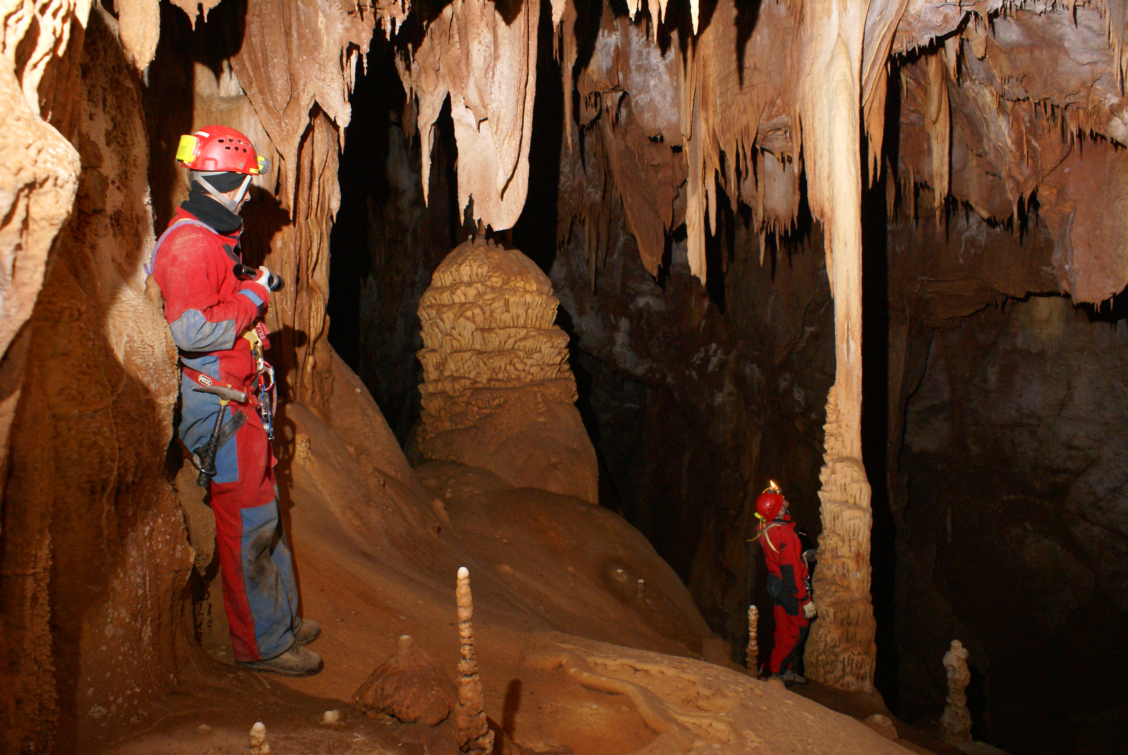 Na sliki je prikazan jamar z vso potrebno opremo. Ko jamar obleče jamarsko obleko, obuje čevlje oz. škornje in nadene čelado s svetilko. Na jamarsko obleko obleče plezalni pas na katerem sta popkovina in prsna prižema. Potem pritrdi še ramenski trak in ročno prižemo. Za spust v jamo potrebuje vrvno zavoro, za plezanje iz nje pa potrebuje prsno in ročno prižemo.